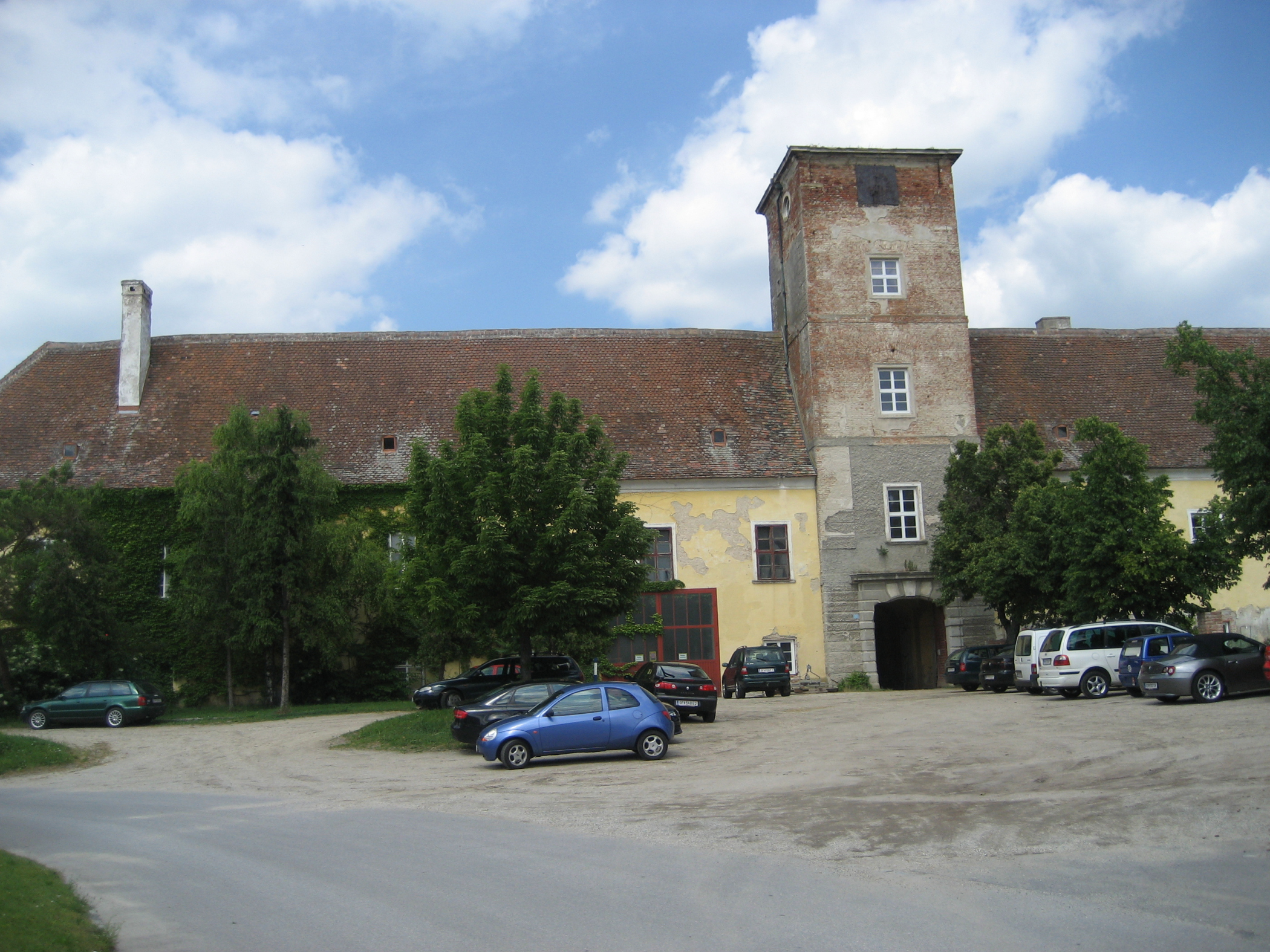 Der Meierhof in Niederabsdorf